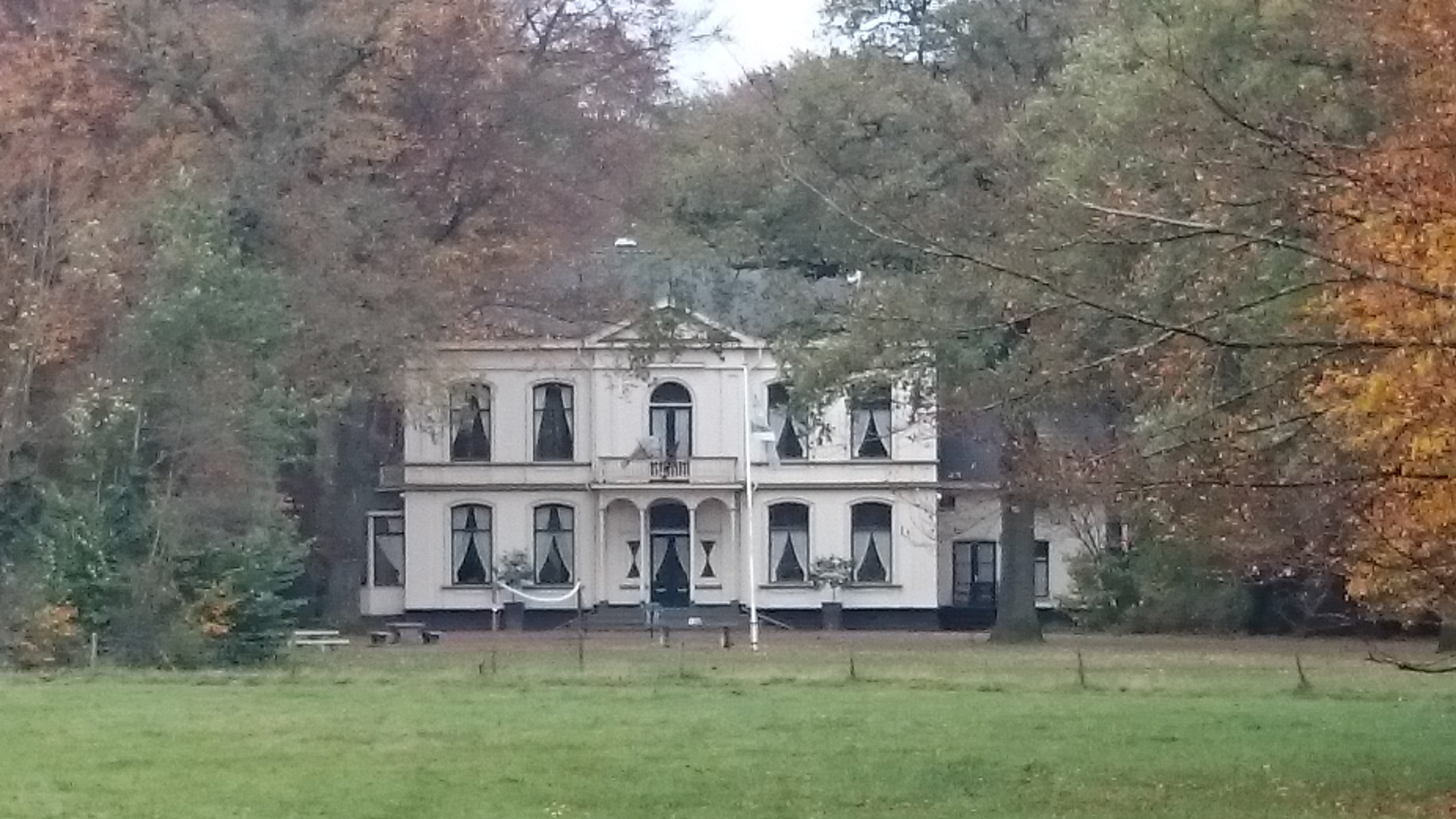 Grote Bunte is een villa te Nunspeet, waar de familie Molijn woonde.